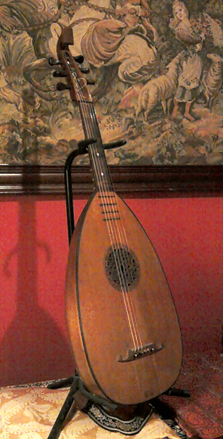 Lutnia romantyczna, także gitarolutnia, Getynga, Niemcy, XIX wiek.